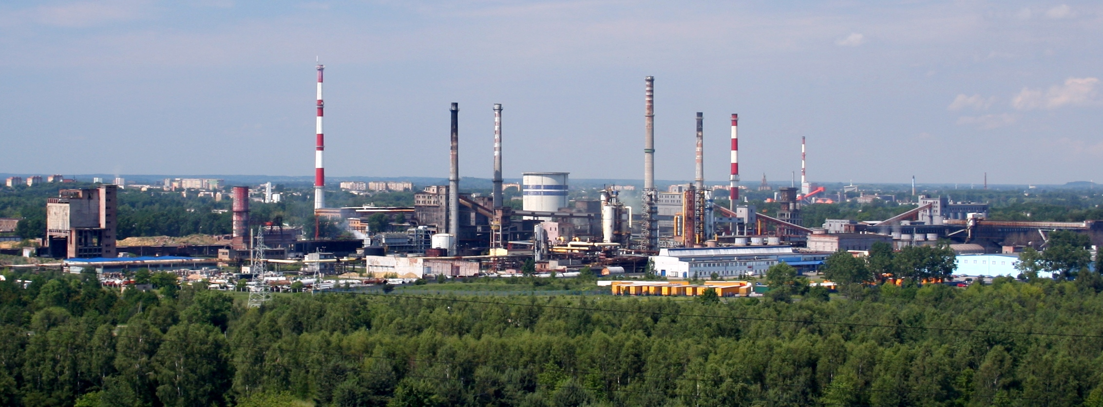 Koksownia Częstochowa - widok z Góry Ossona